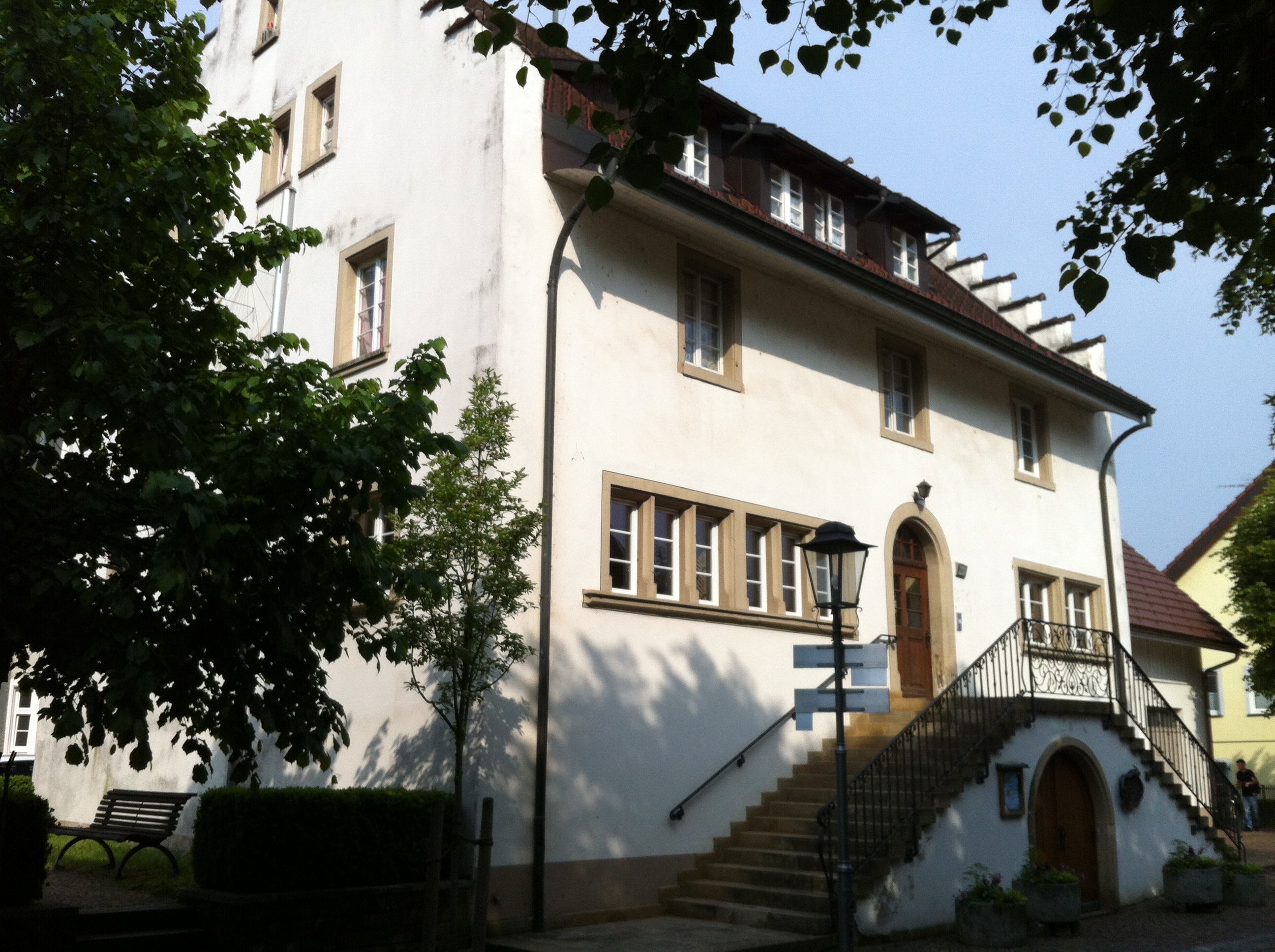 Küssaberg, Gemeinde im Landkreis Waldshut in Baden-Württemberg. Kaiserliches Jagdhaus in Rheinheim (Museum Küssaberg).